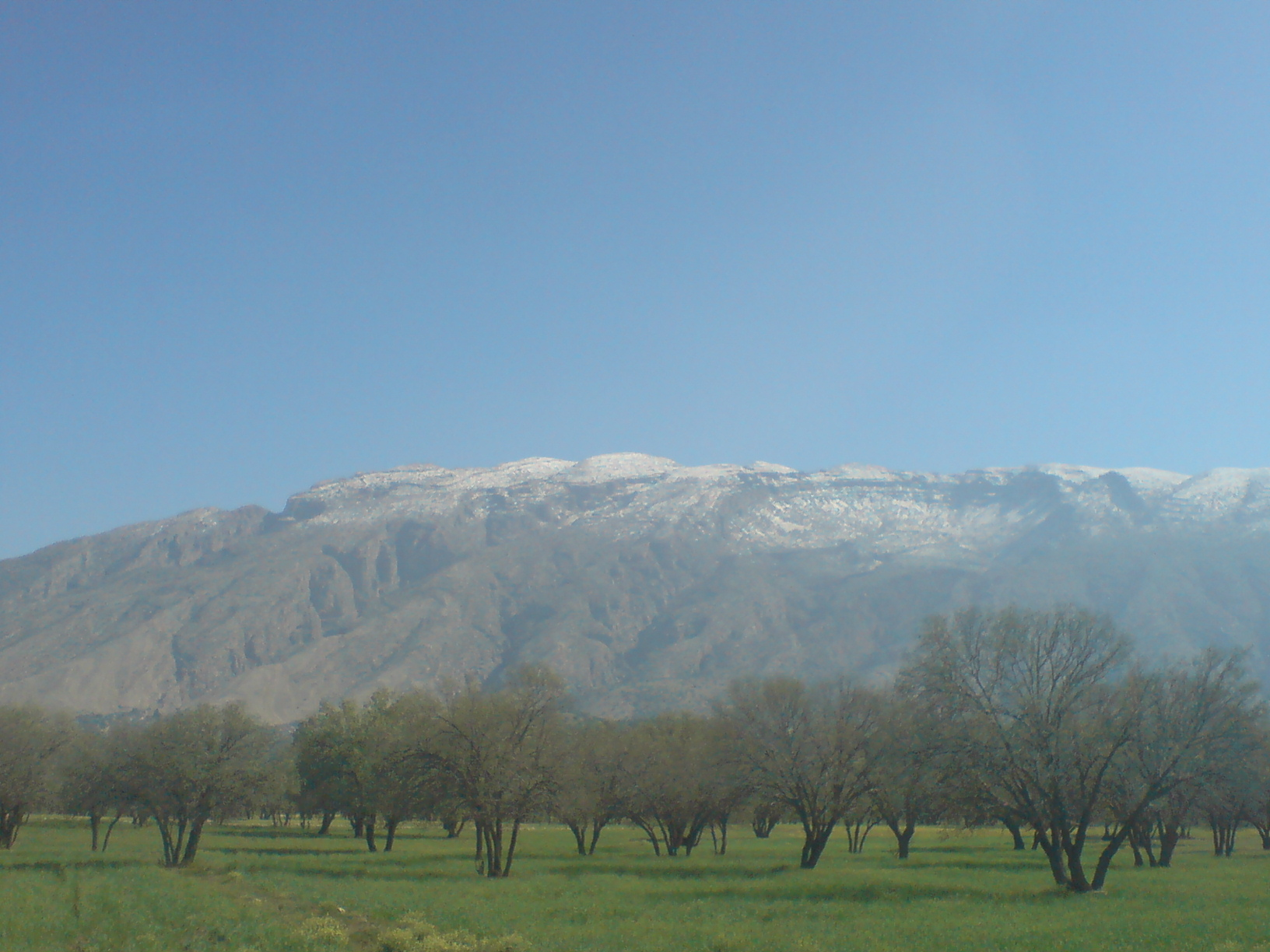 دشت برم،کازرون